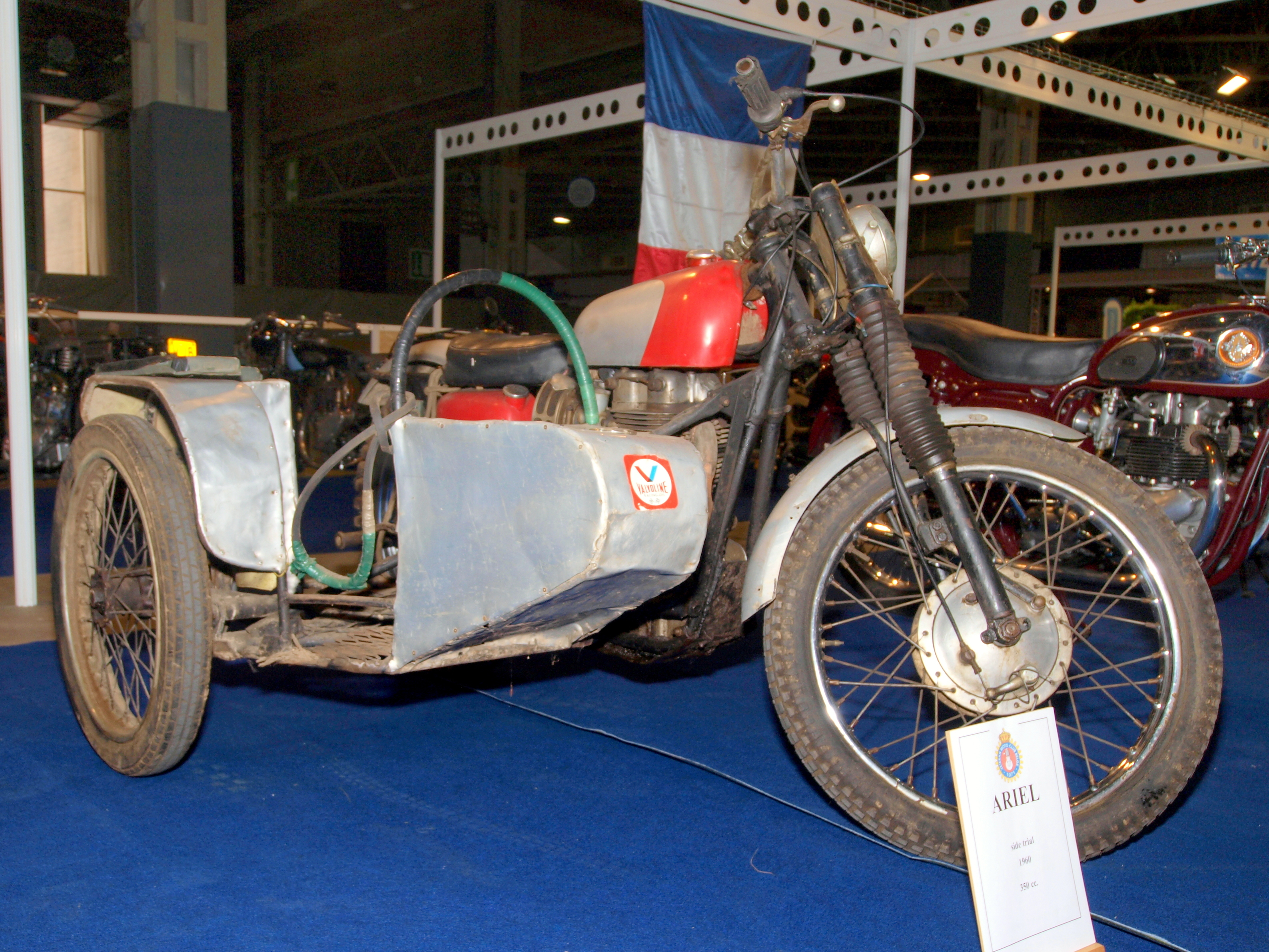 Ariel 350cc Side Trial (1960).